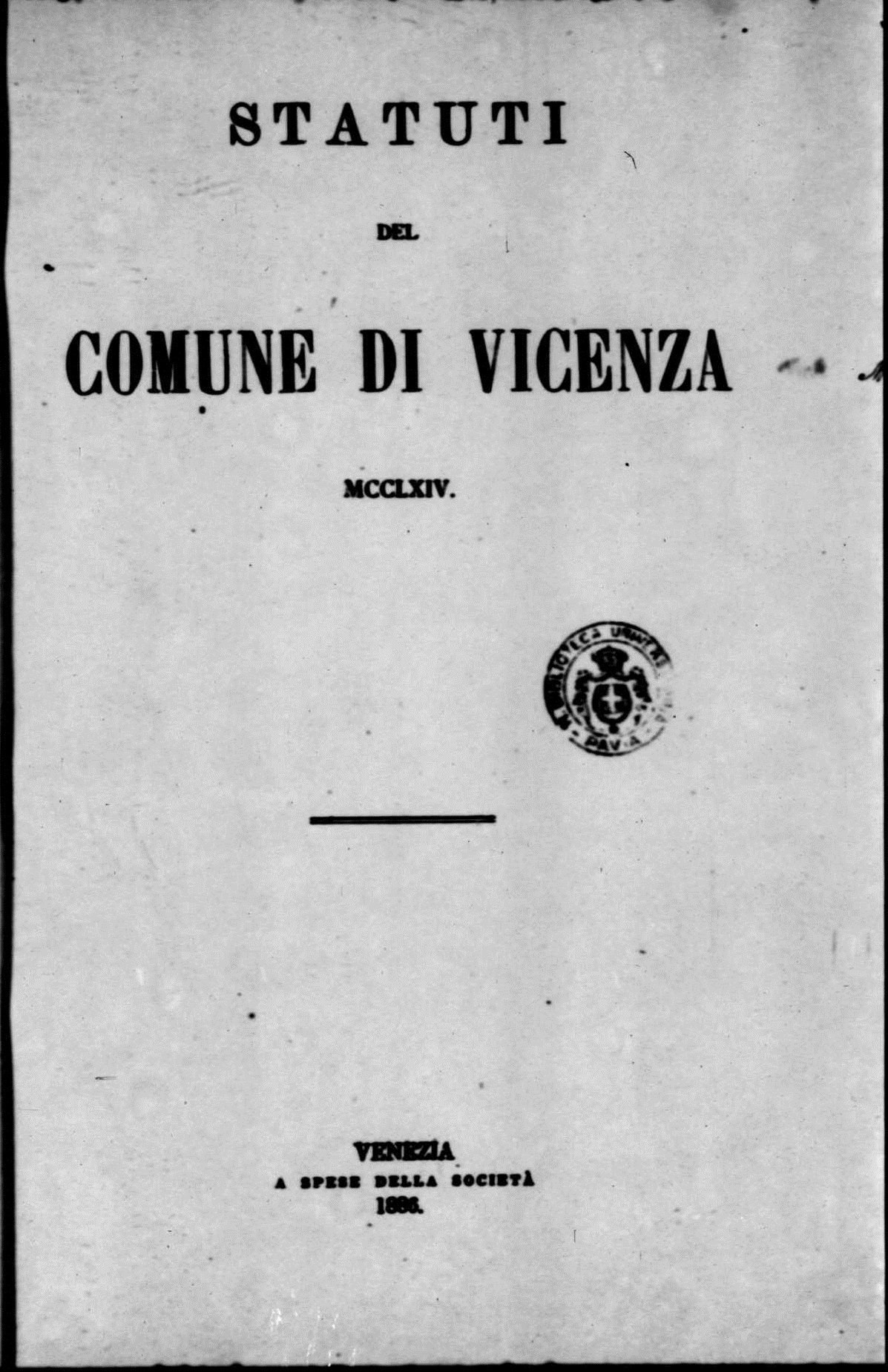 Frontespizio